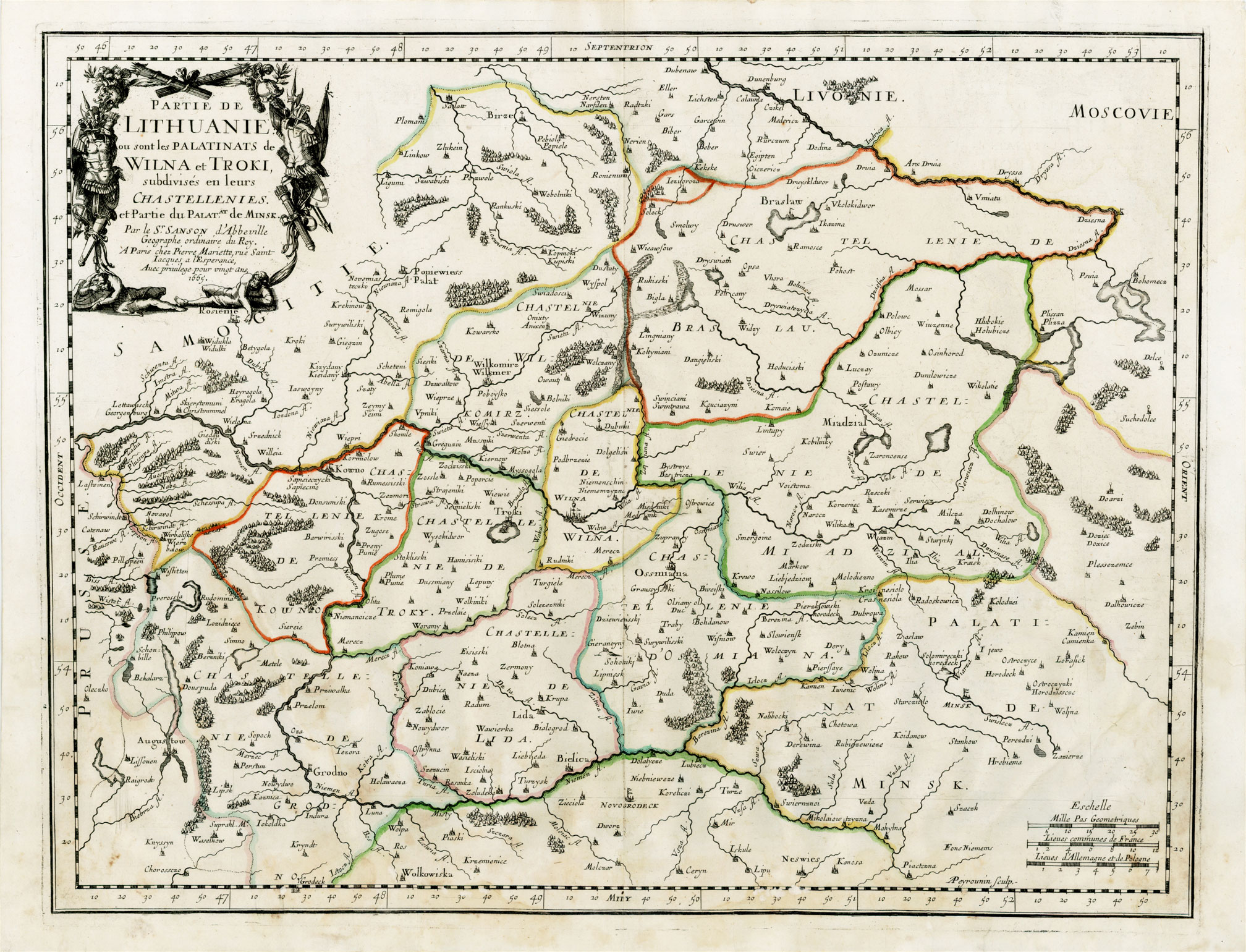 Беларуская (тарашкевіца): Мапа Віленскага і Троцкага ваяводзтваў